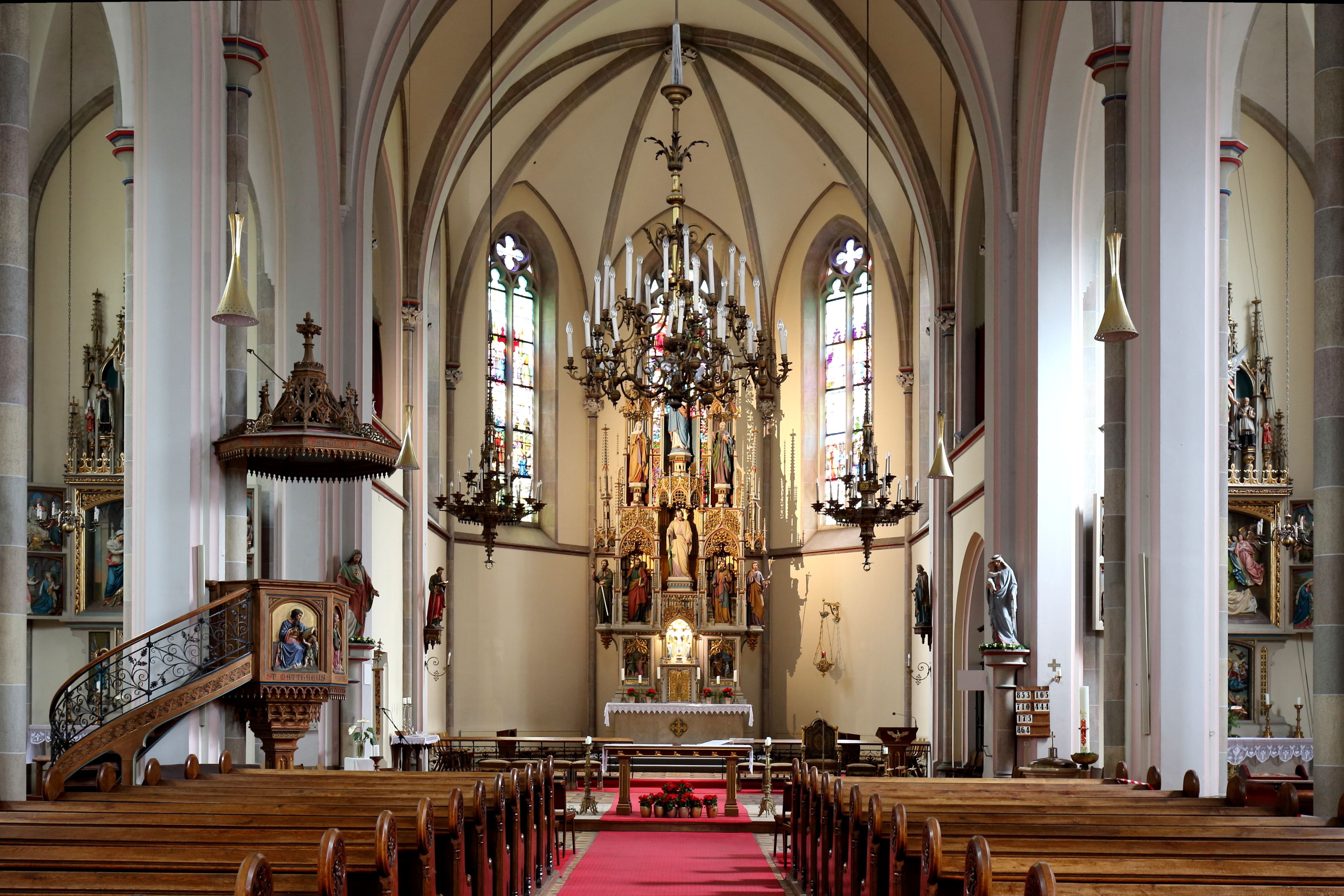 Innenansicht Richtung Hochaltar der römisch-katholischen Weinhauser Pfarrkirche im 18. Wiener Gemeindebezirk Währing. Die Kirche wurde nach Plänen des Wiener Dombaumeisters Friedrich von Schmidt unter Baumeister Johann Schmalzhofer von 1883 bis 1893 errichtet.